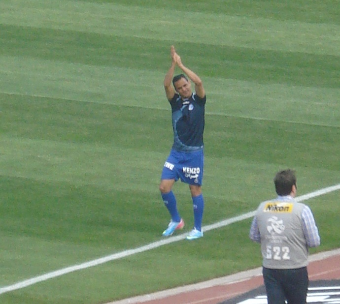 Arash Borhani, Esteghlal-Damash match, 2012-13 Iran Pro League